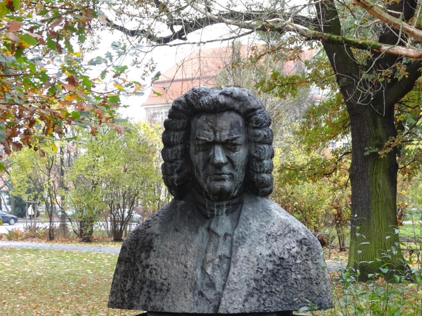 Popiersie Jana Sebastiana Bacha w parku im. Jana Kochanowskiego w Bydgoszczy w pobliżu Filharmonii Pomorskiej